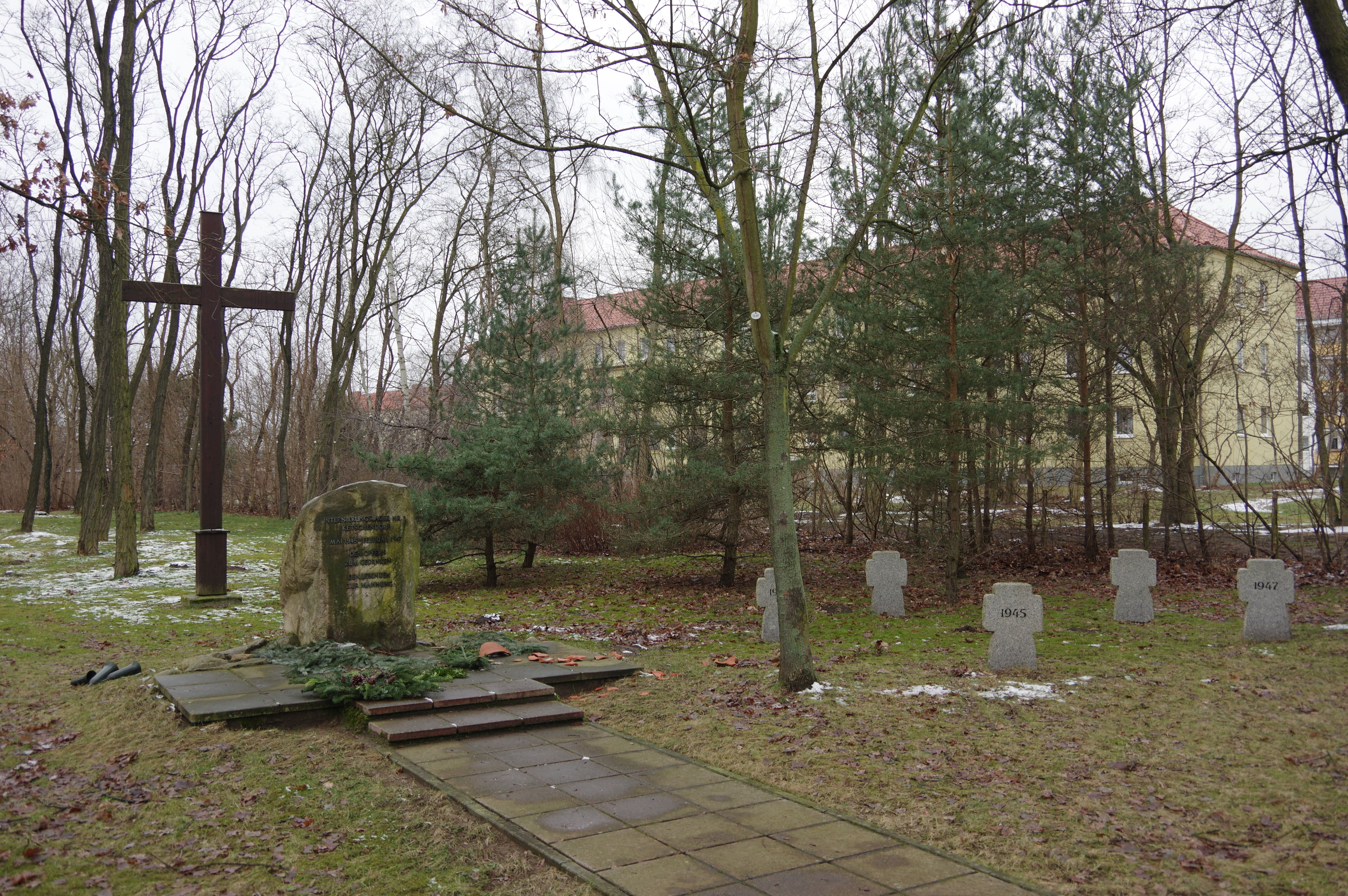 Fürstenwalde/Spree in Brandenburg. Im Süden von Fürstenwalde befand sich das Speziallager Ketschendorf. Die Gedenkstätte erinnert an die Toten aus diesem Speziallager, das 1945 nach dem Kriegsende von den sowjetischen Truppen errichtet wurde und in dem für die Besatzungstruppen als gefährlich eingestufte Personengruppen und später als dem zu errichtenden kommunistischen Regime ablehnend gegenüberstehend eingestufte Personen gefangengehalten wurden.